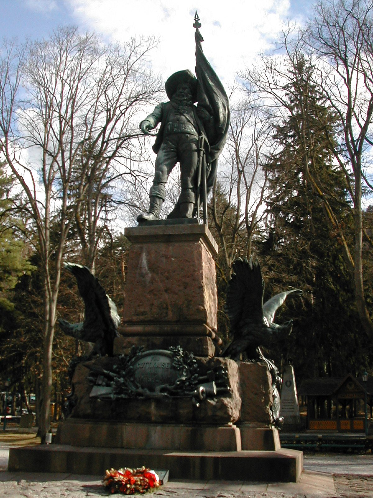 Andreas-Hofer-Denkmal am Berg Isel bei Innsbruck